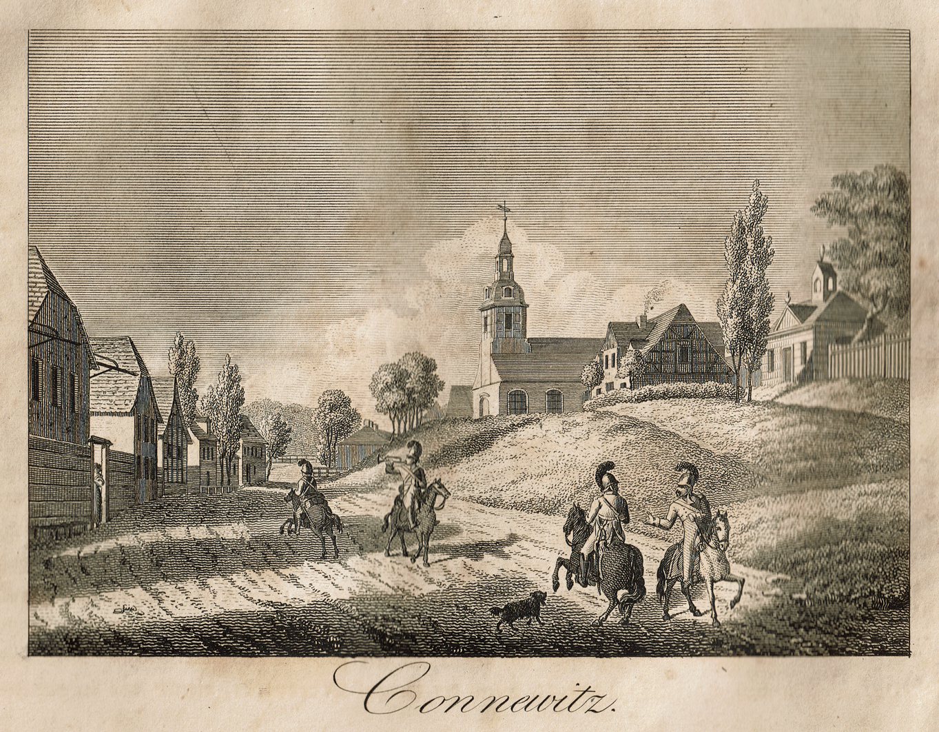 Ansicht von Connewitz nach der Völkerschlacht 1813